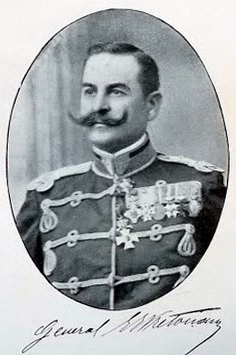 D- General Eracle Pretorian